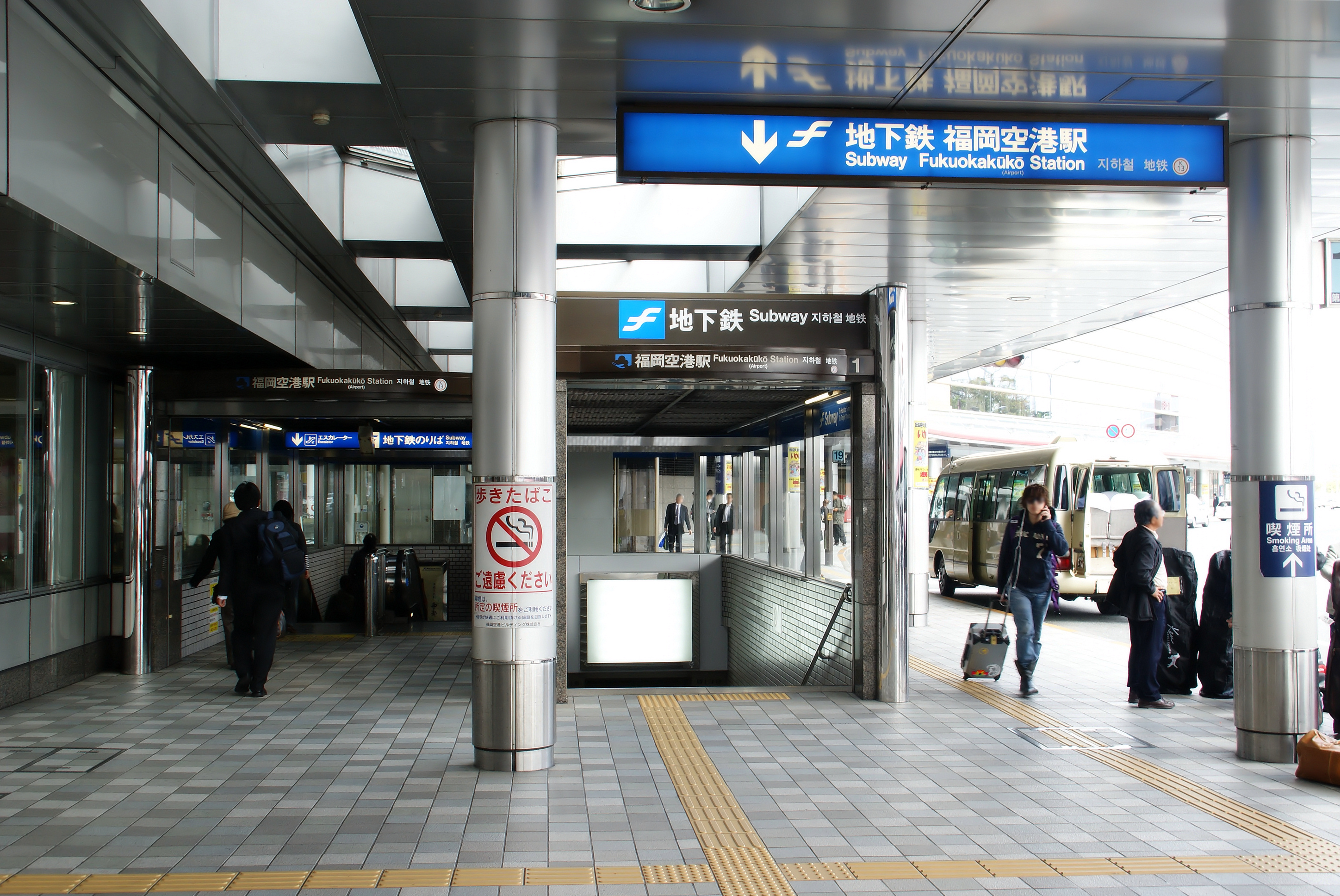 Fukuoka City Transportation Bureau, Fukuoka Airport Station.(Hakata Ward, Fukuoka City, Fukuoka Prefecture, Japan)